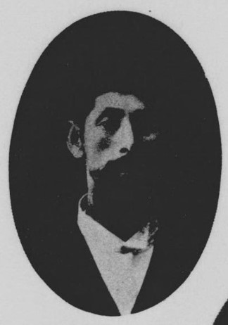 林宗右衛門（1845～1896）